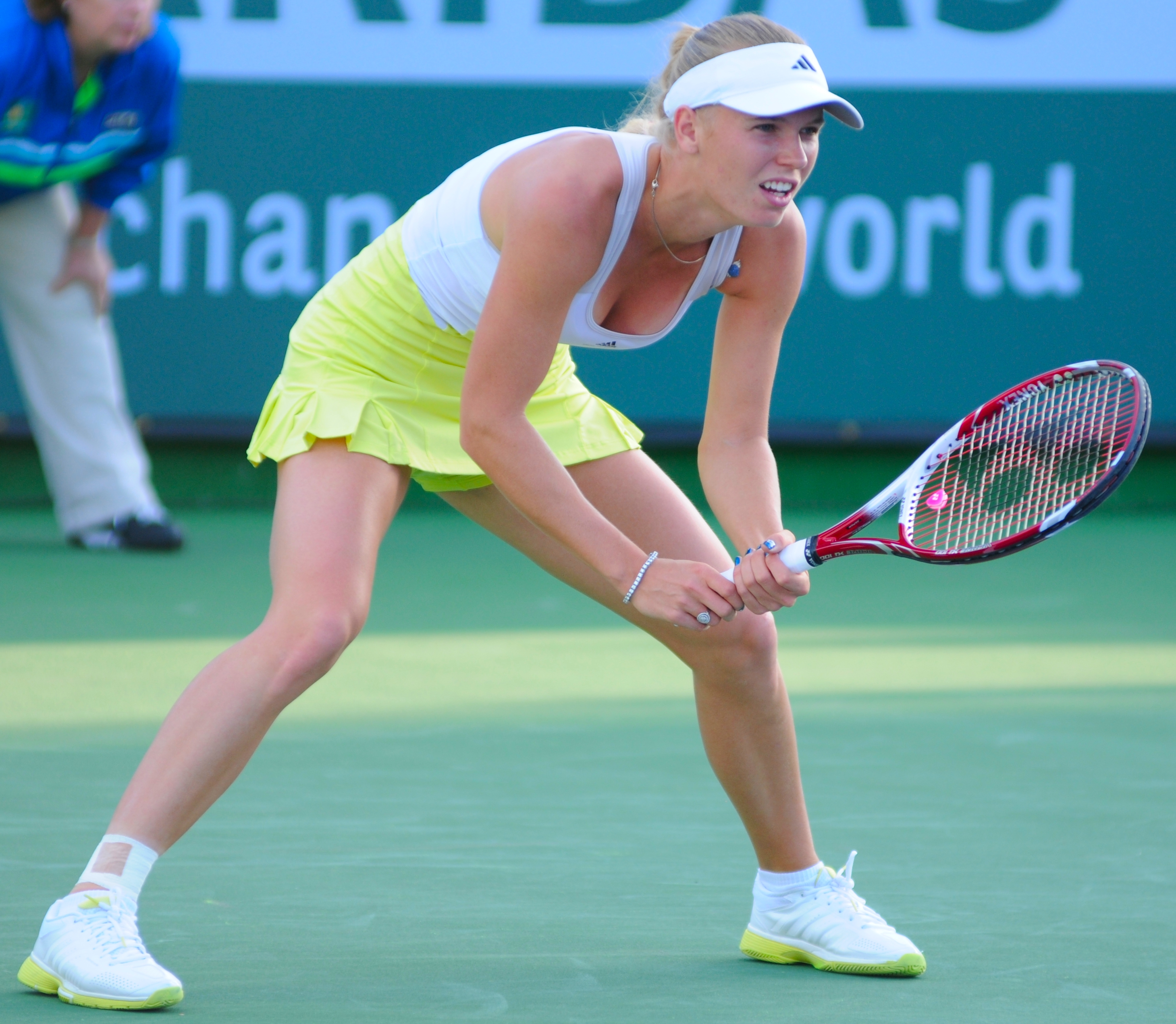 Caroline Wozniacki in risposta durante il torneo BNP Paribas Open 2013